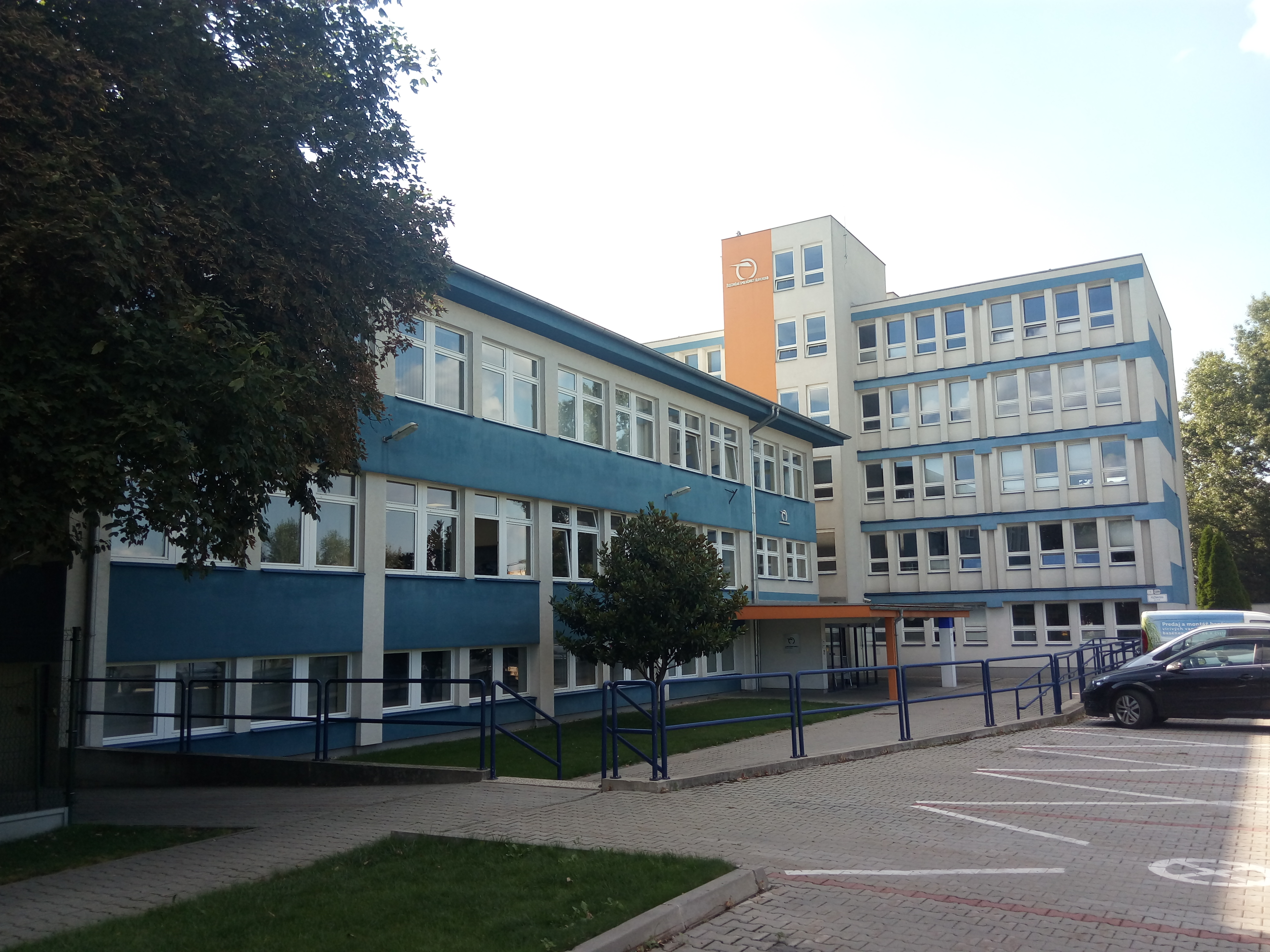 Rožňavská 1, Nové Mesto, Bratislava